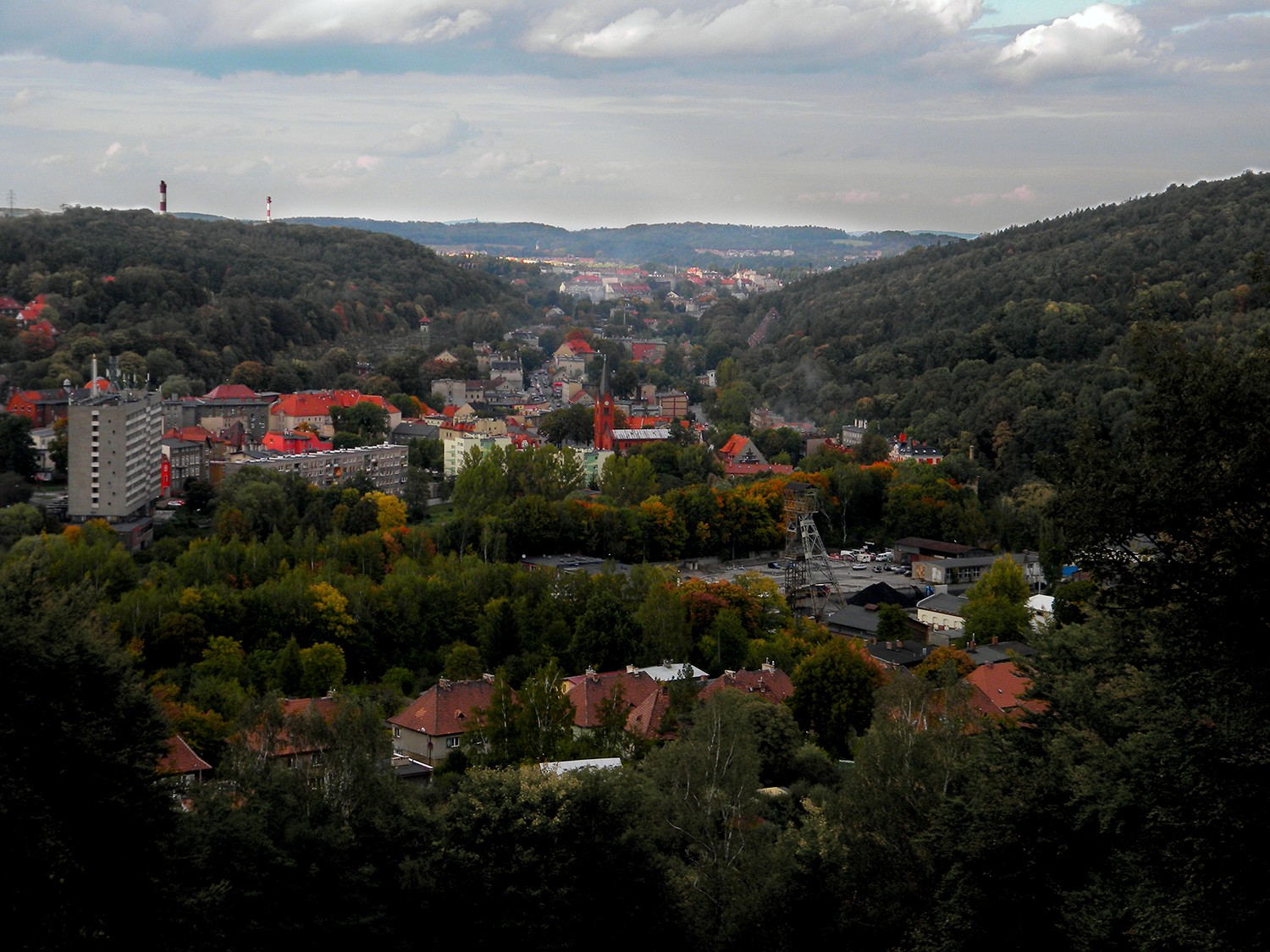 Dzielnica Wałbrzycha - Stary Zdrój, jako historyczny układ urbanistyczny, XIV, XVIII - XIXXX. Zdjęcie wykonane z "Góry Parkowej" w Parku Miejskim im. Sobieskiego w Wałbrzychu. //zerg1995